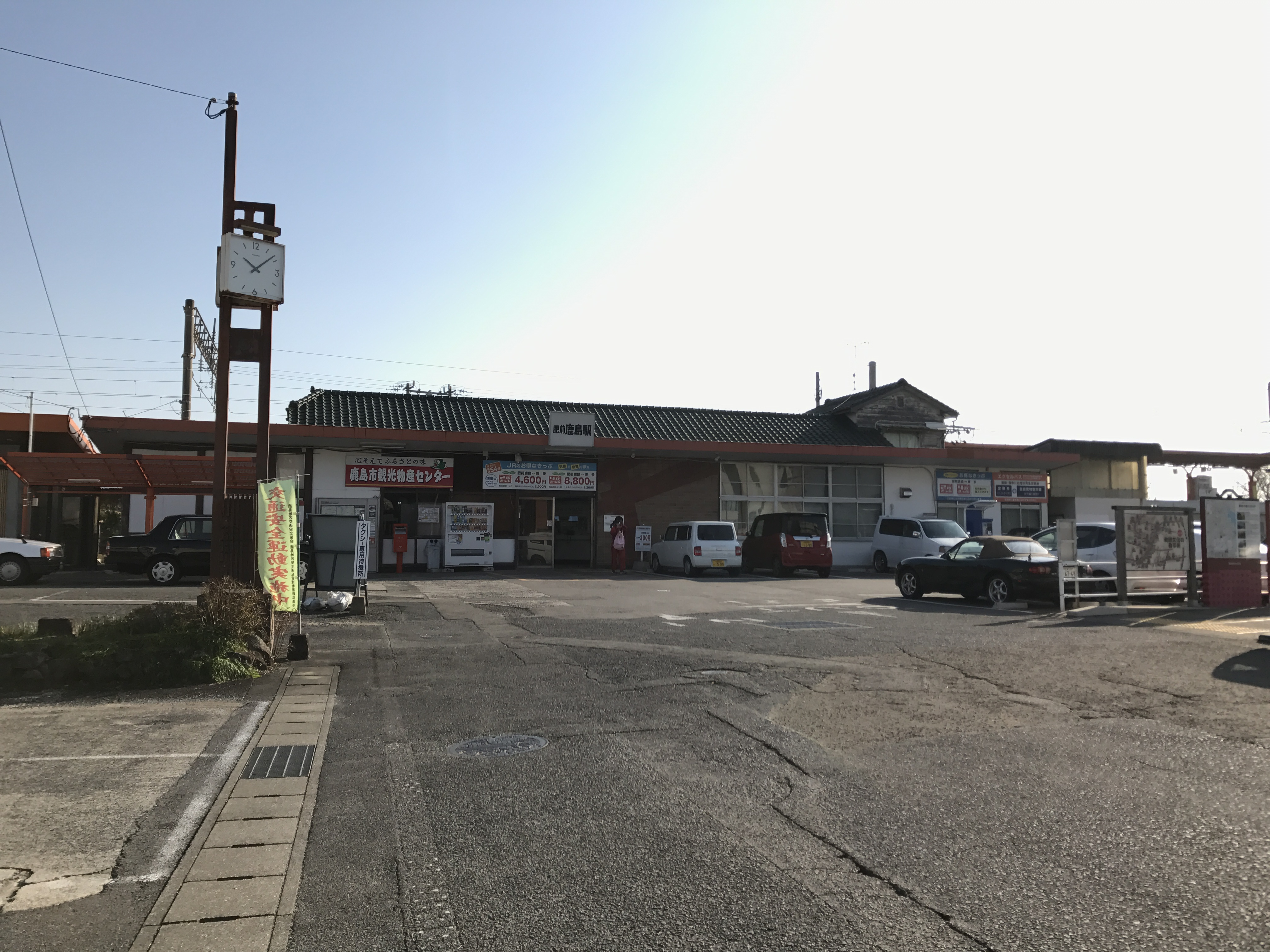 肥前鹿島駅駅舎